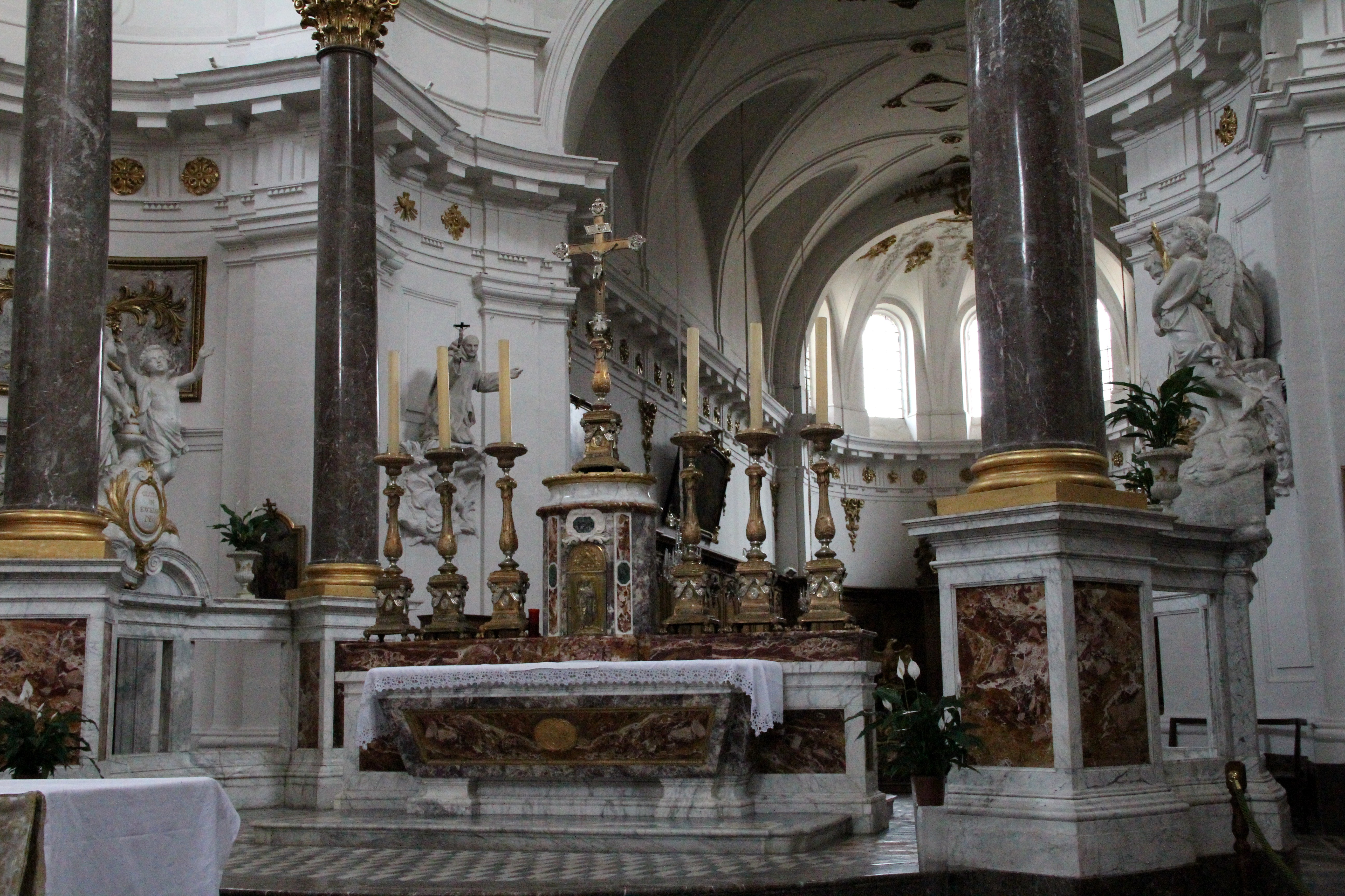 Lyon (Rhône, France), église St Bruno-les-Chartreux, maître-autel.